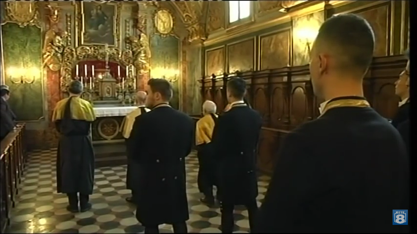 I paggi e membri dell'Arciconfraternita del Sacro Monte dei Morti pregano in un oratorio prima della Processione del Venerdì Santo di Chieti